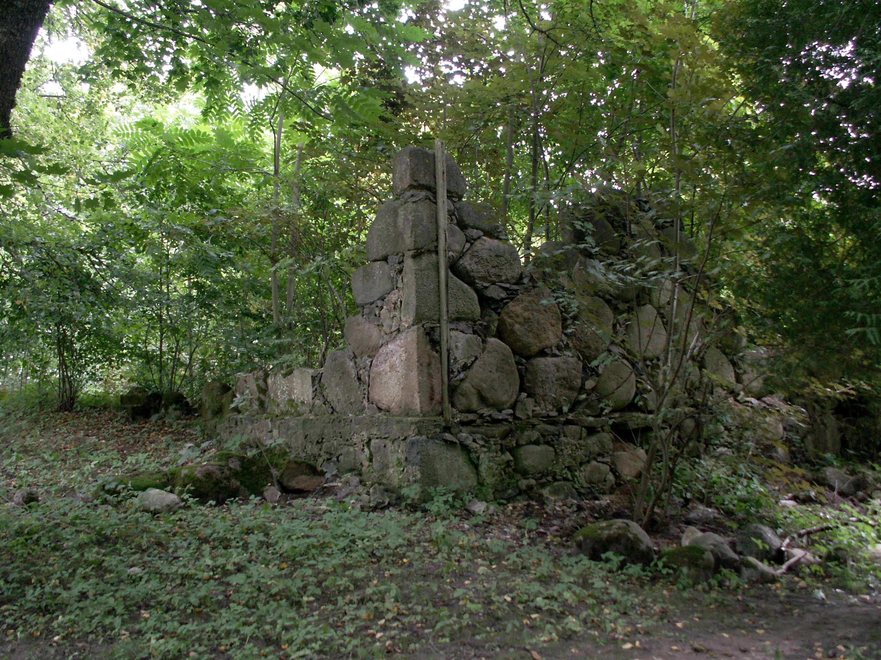 Lielaucė, Lielaucės pagastas, Latvija